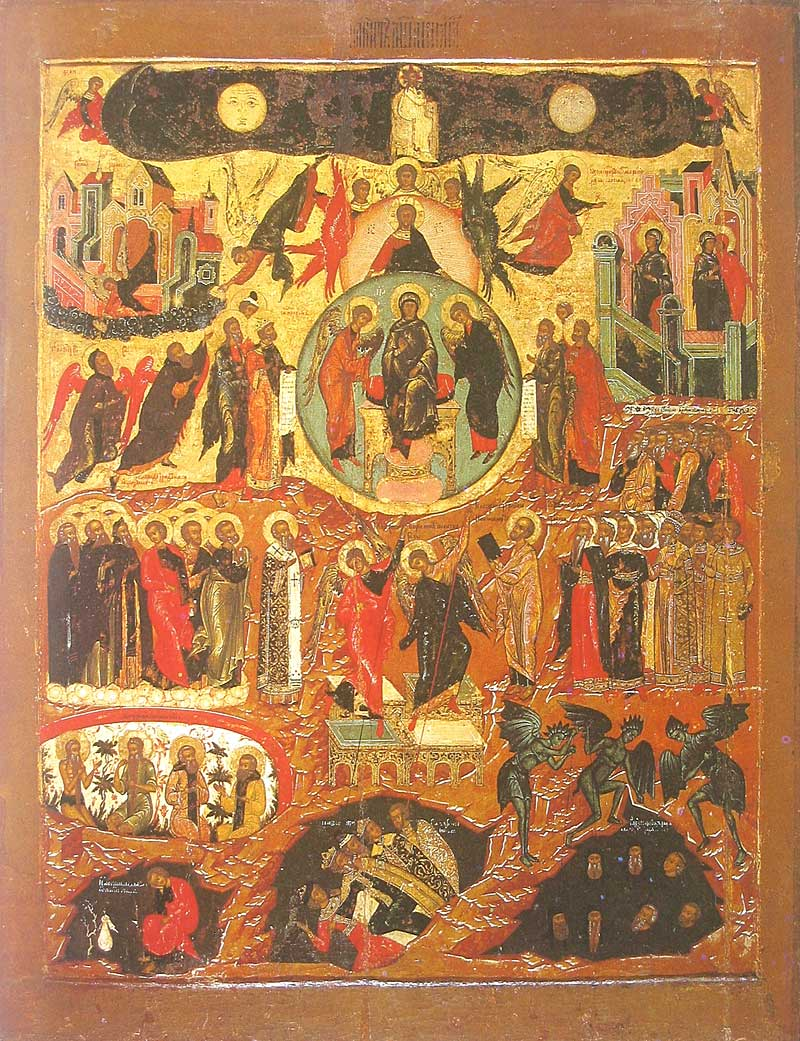 Величит душа моя Господа Школа или худ. центр: Ярославль Середина XVII в. 116 × 88 см Ярославский историко-архитектурный и художественный музей заповедник, Ярославль, Россия Инв. И-1148